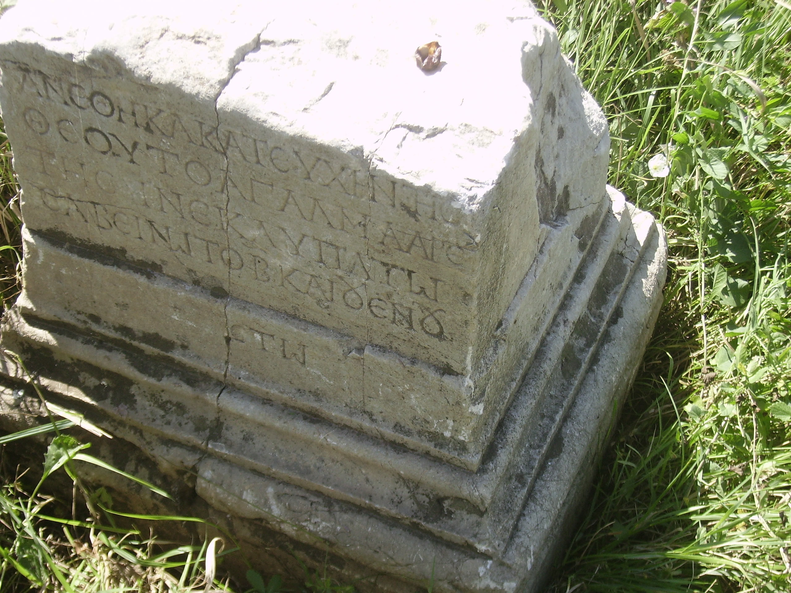 Надпис на гръцки език известен на историческата ни наука като “Негованският надпис” и е вписан в националния регистър на древните надписи. Надписът е разчетен и регистриран през 1894 година от Херман Шкорпил. Той гласи: “Издигната за добър спомен на бога статуя, колкото може прелестна, когато бяха консули Сабин за втори път и Венуст”.